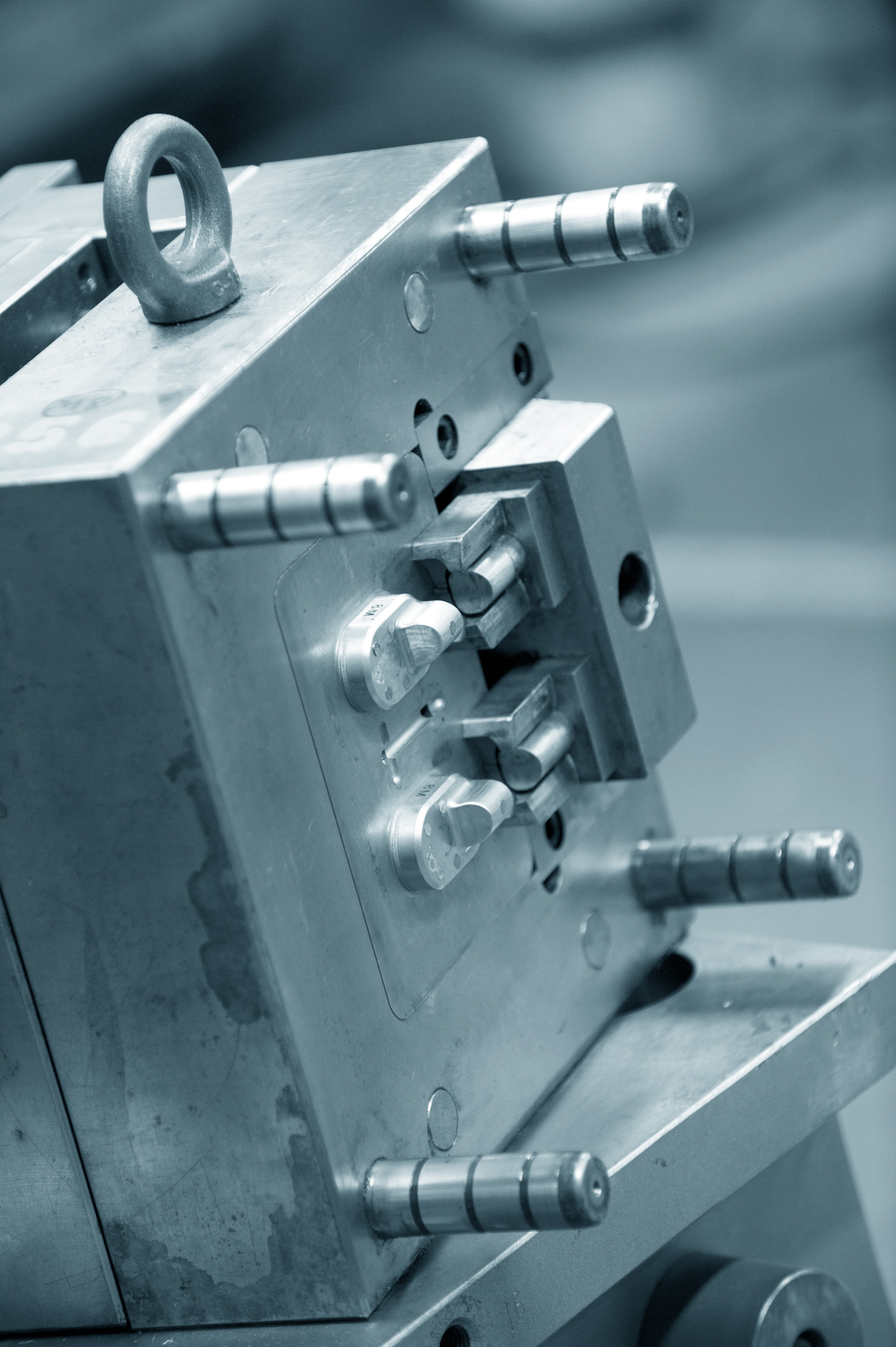 Formsprutnings verktyg till plastproduktion, 2 fack